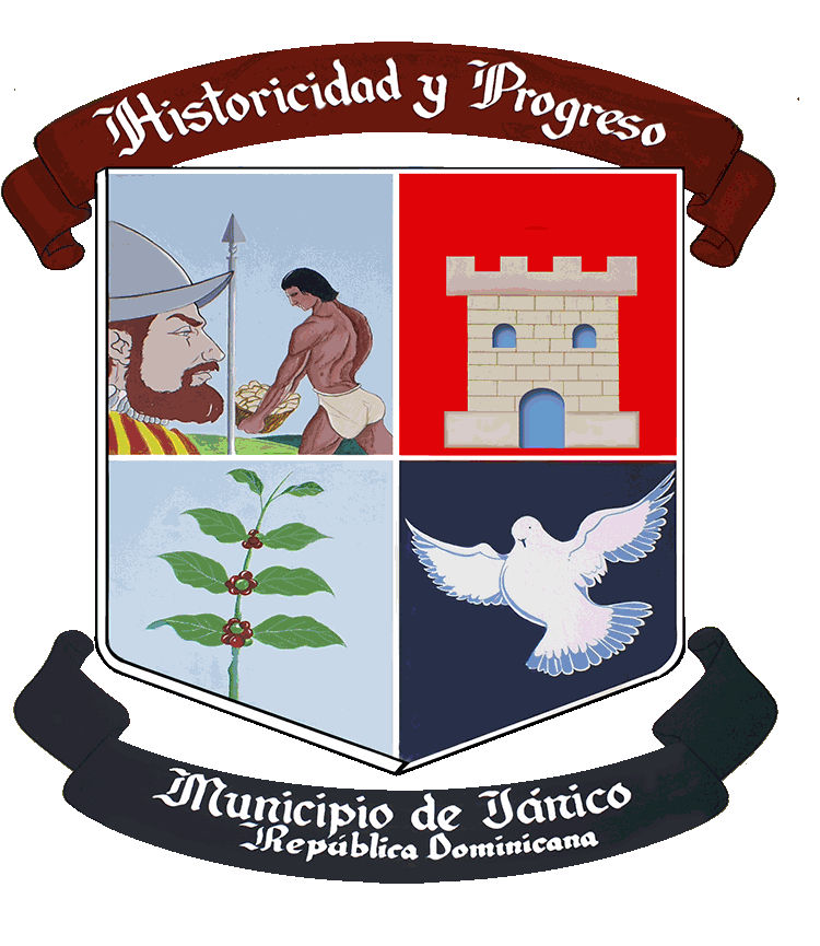 escudo janico